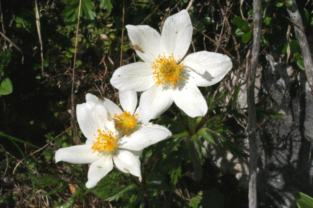 Anemone baldensis - Località: sorgenti del Piave, Sappada (BL), 1820 m s.l.m.